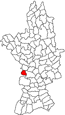 Categorie:Hărţi ale judeţului Olt